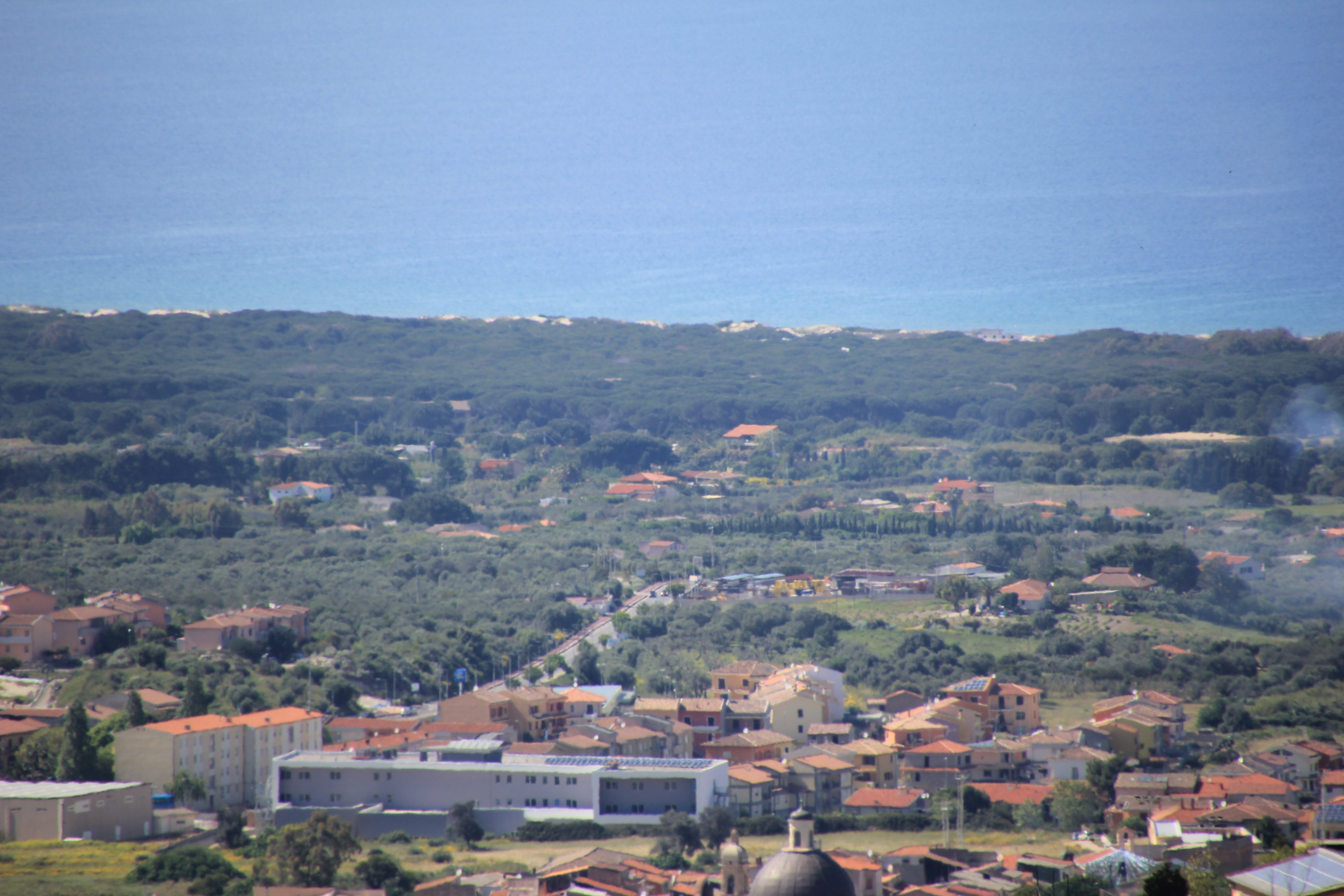 Sorso - Arboriamar